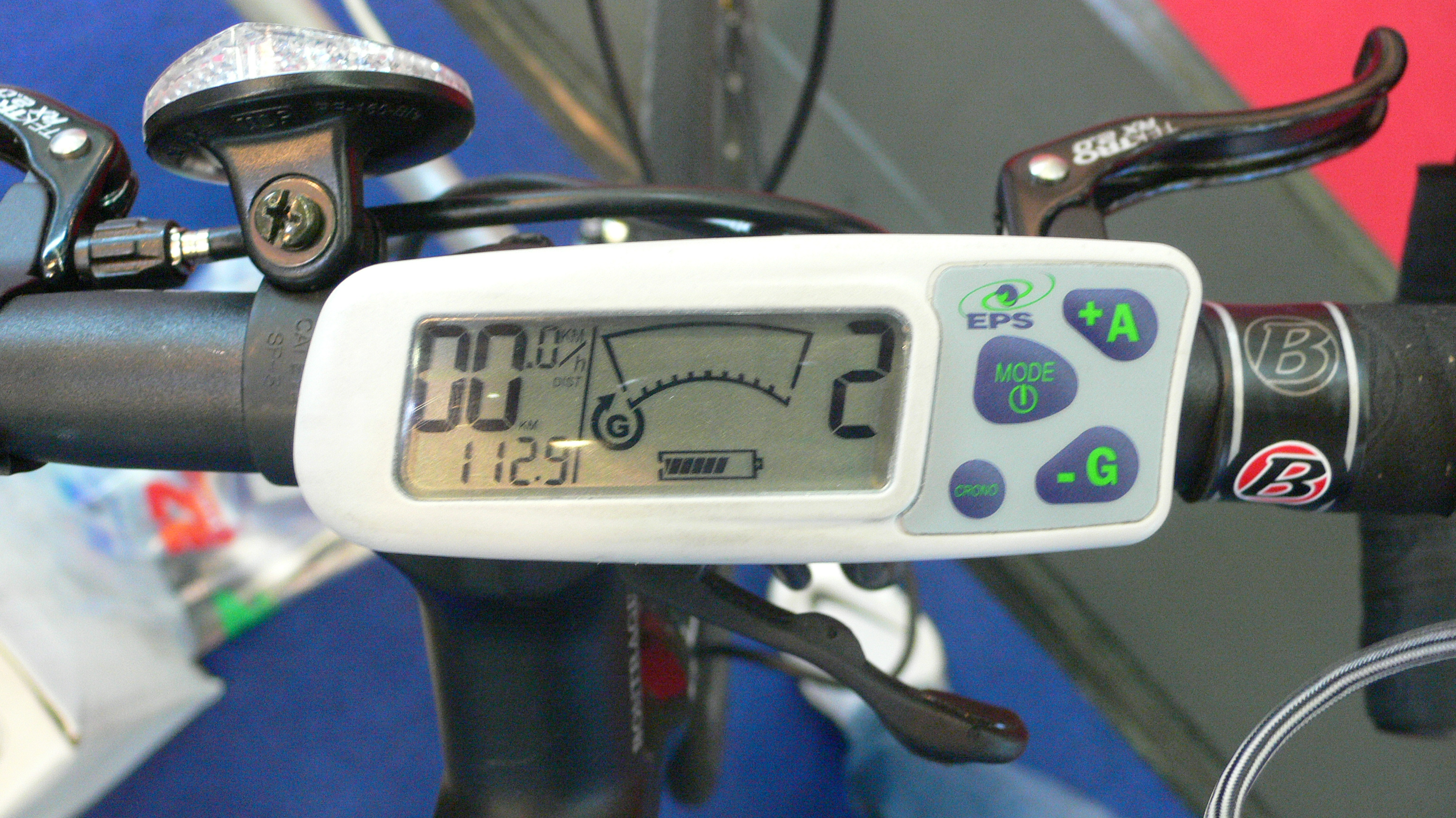 Eingebauter Gegenwind: Mit -G erzeugt man Widerstand. Kein Quatsch. Für's Training.